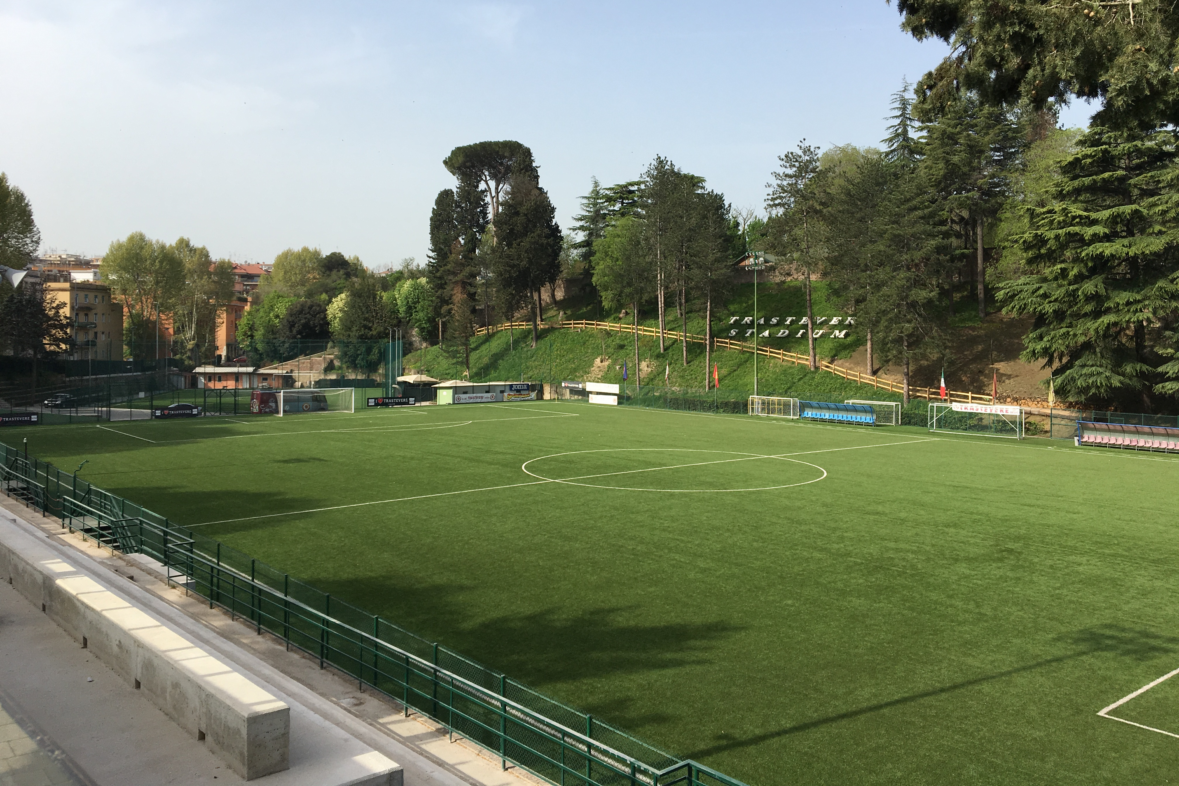 il Trastevere Stadium